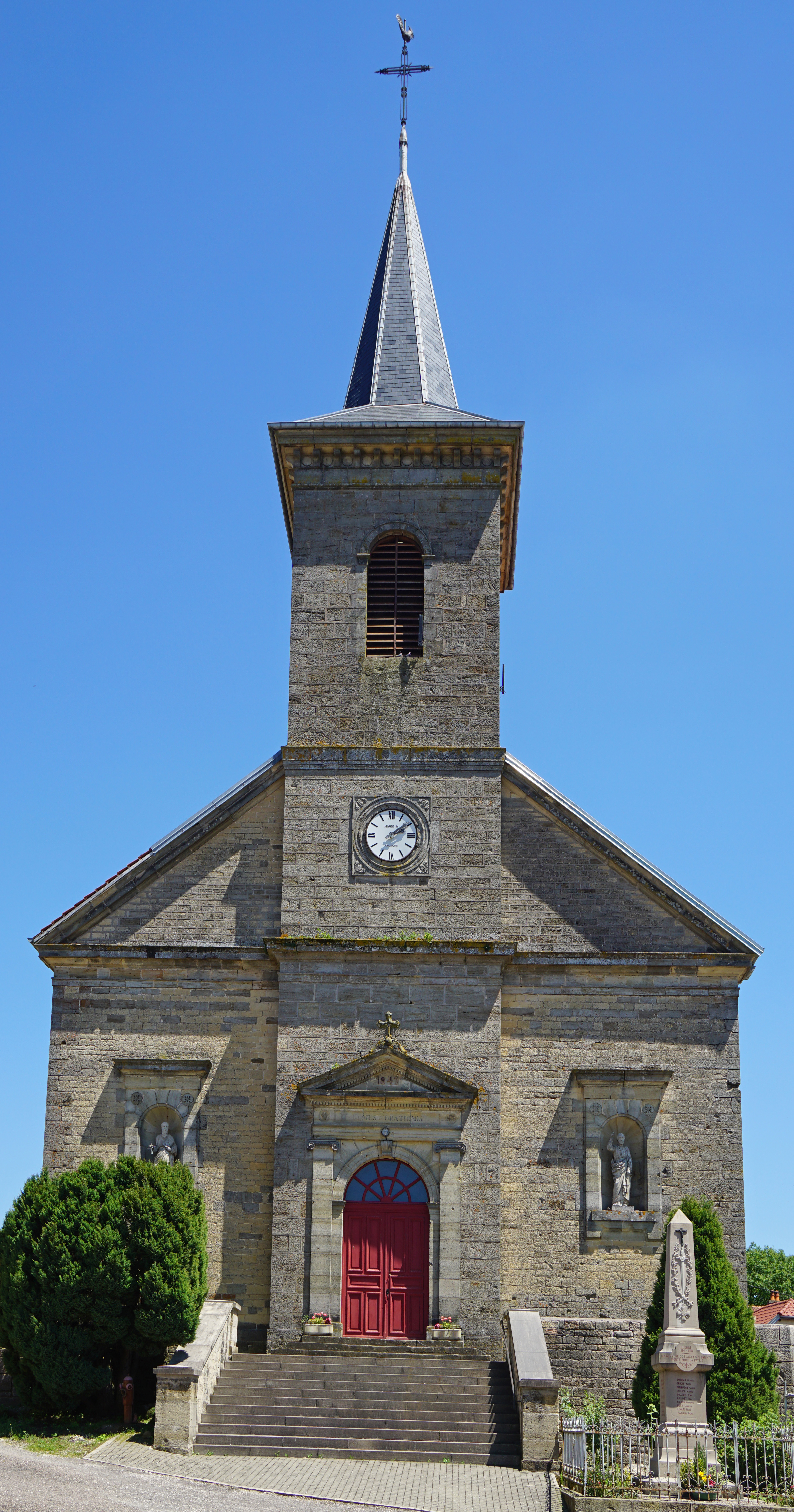 L'église de Flagy.